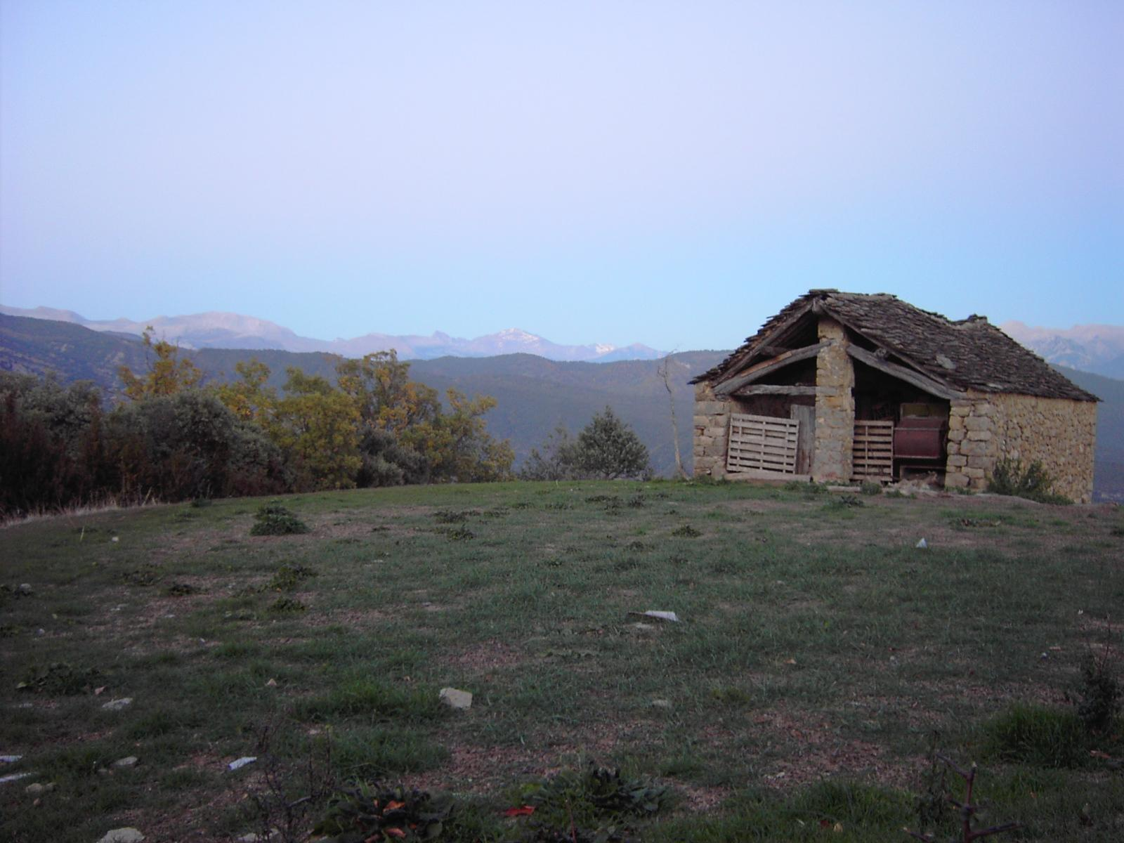 Una borda en Silves.